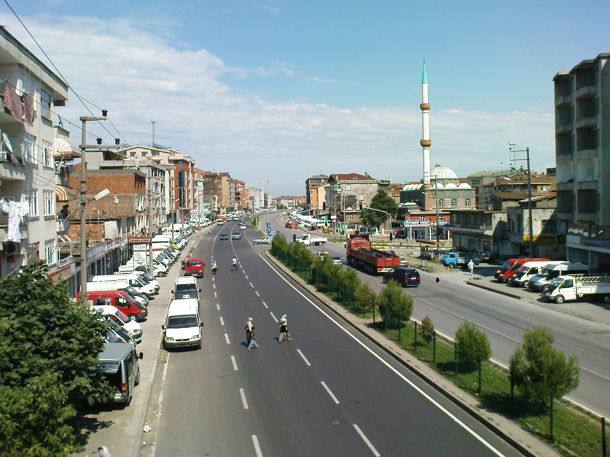 üstgecitten görünüm , terme , samsun , turkey